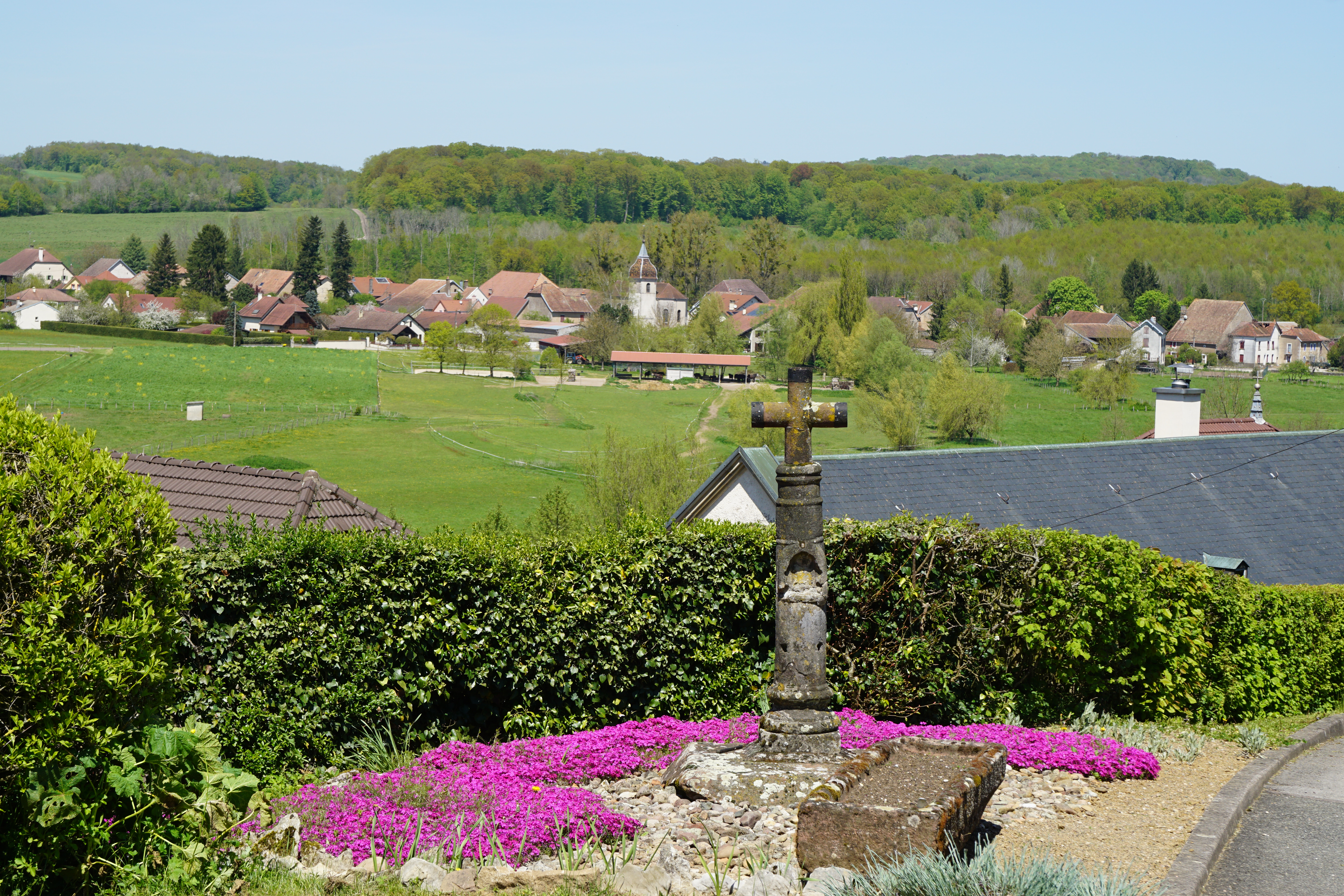 Vue générale de Saint-Sulpice (Haute-Saône).